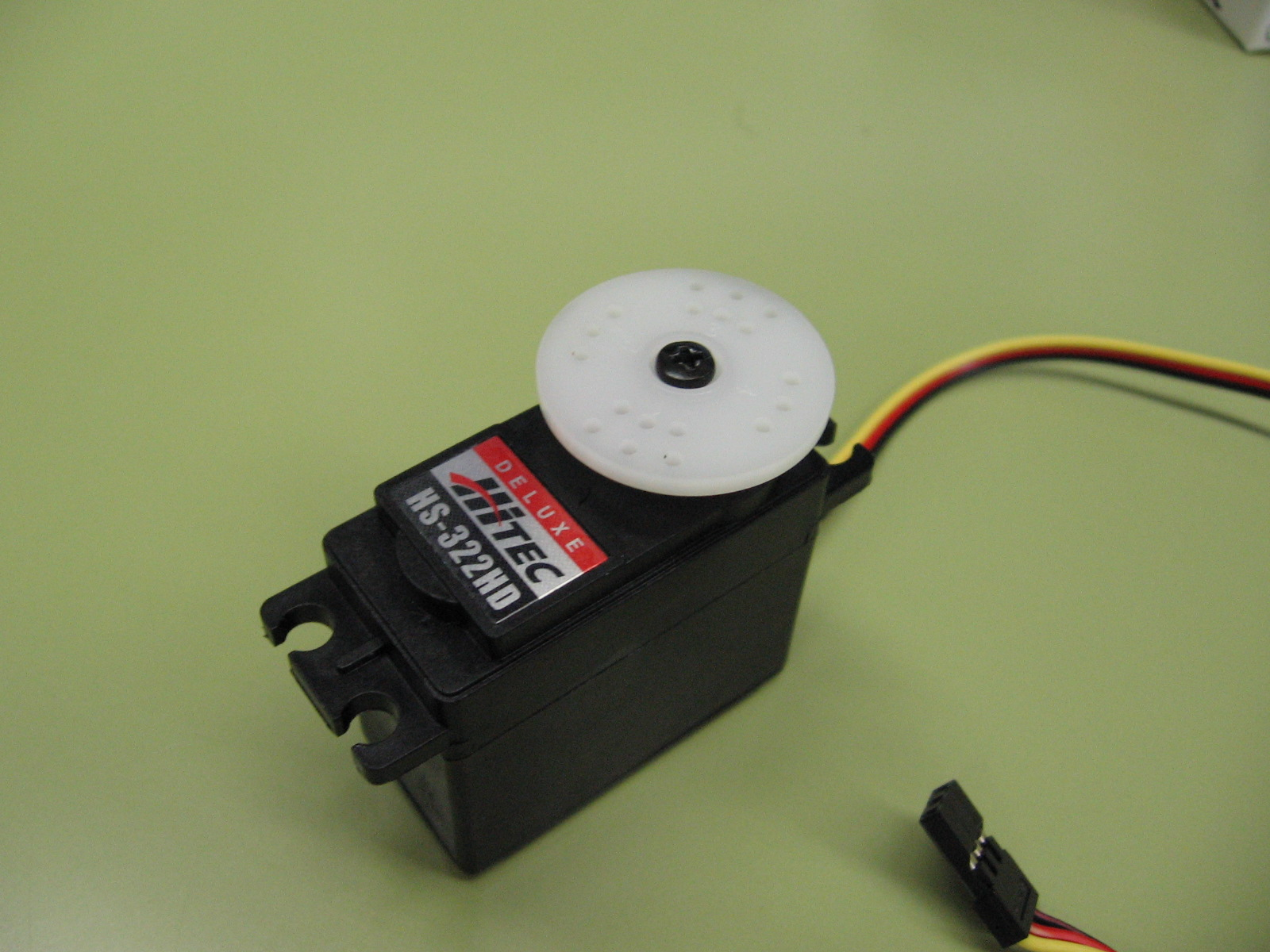 Servomotor (Servomechanism)